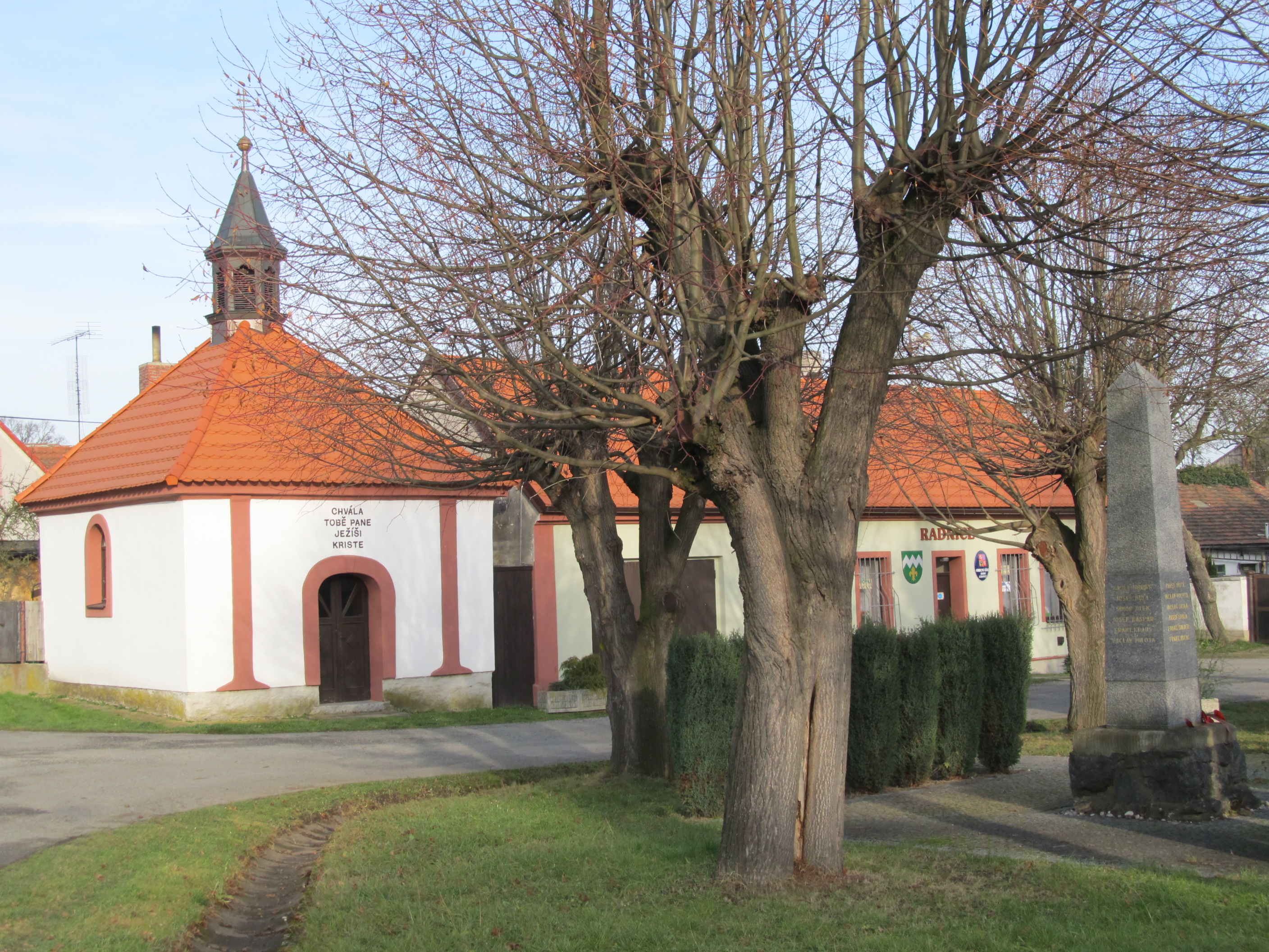 Horní Lukavice - náves